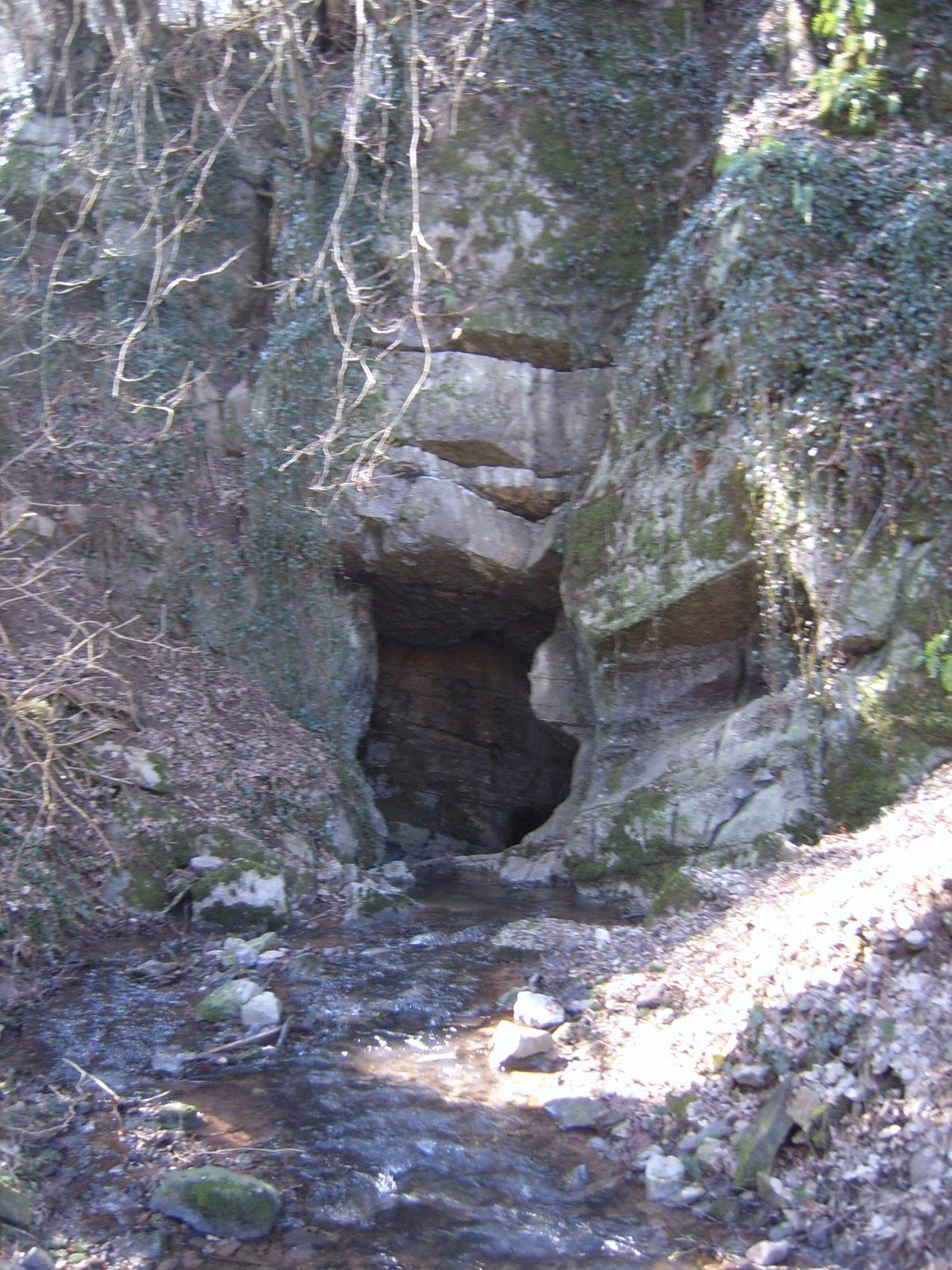 Un Aven dans le Chantoir de Rouge-Thier à Deigné. Le Chantoir de Rouge-Thier est situé au système karstique du Vallon des Chantoirs, Belgique.